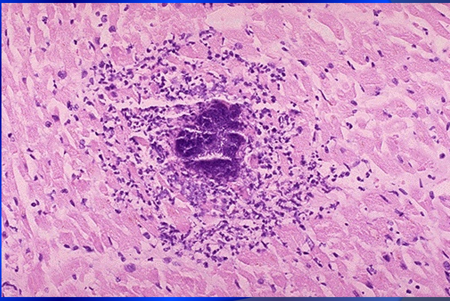 Imagen microscopica de una Miocarditis